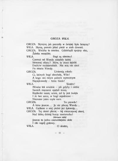 Strona z tragedii Antoniego Lange "Wenedzi" (1909) dedykowanej Juliuszowi Słowackiemu